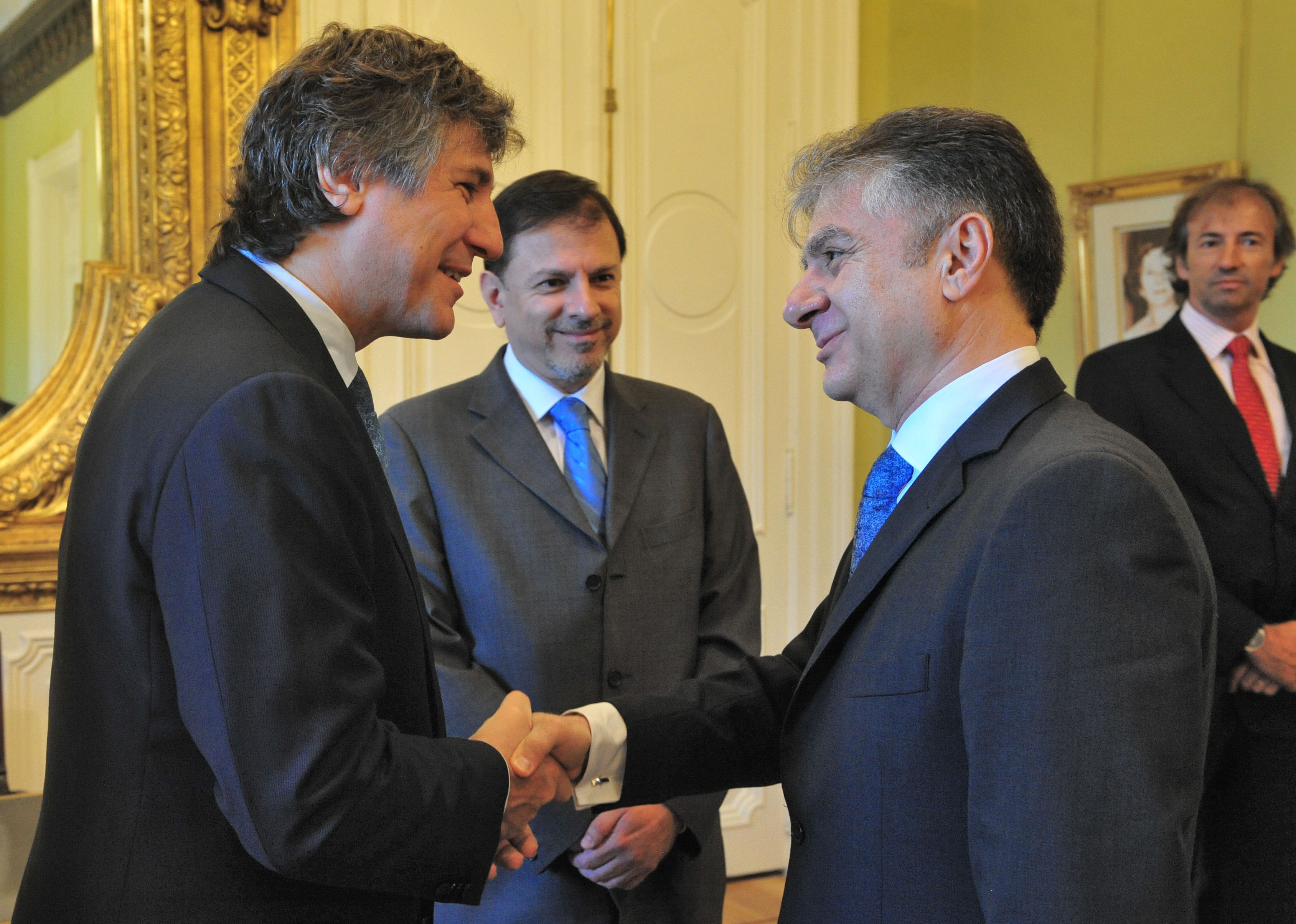 En el Salón de los Científicos, lindero al despacho del vicepresidente, fueron recibidos los diplomáticos Barrister Kaave (Nigeria), Zeljko Belaj (Croacia) y Néstor Pérez Sánchez Cerro (Perú). También presentaron sus cartas credenciales Taner Karakas (Turquía), Pradhhumna Birkam (Nepal), Antonis Toumazis (Chipre).